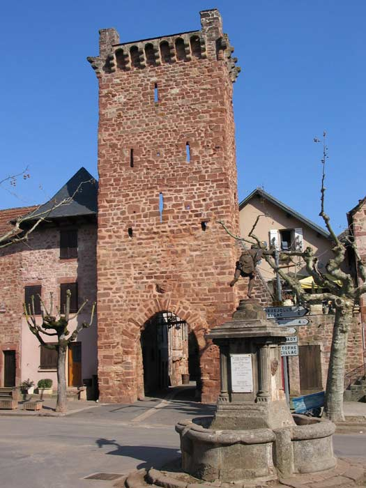 Tour de Clairvaux